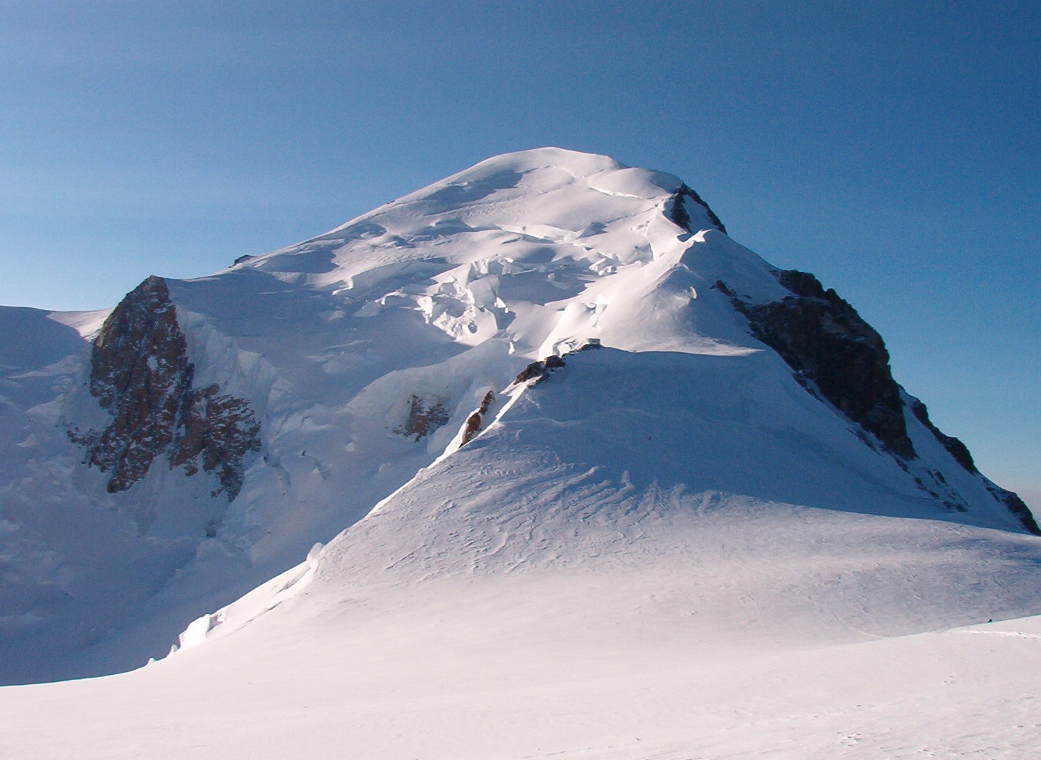 Vista del Monte Bianco dal Dome du Gouter